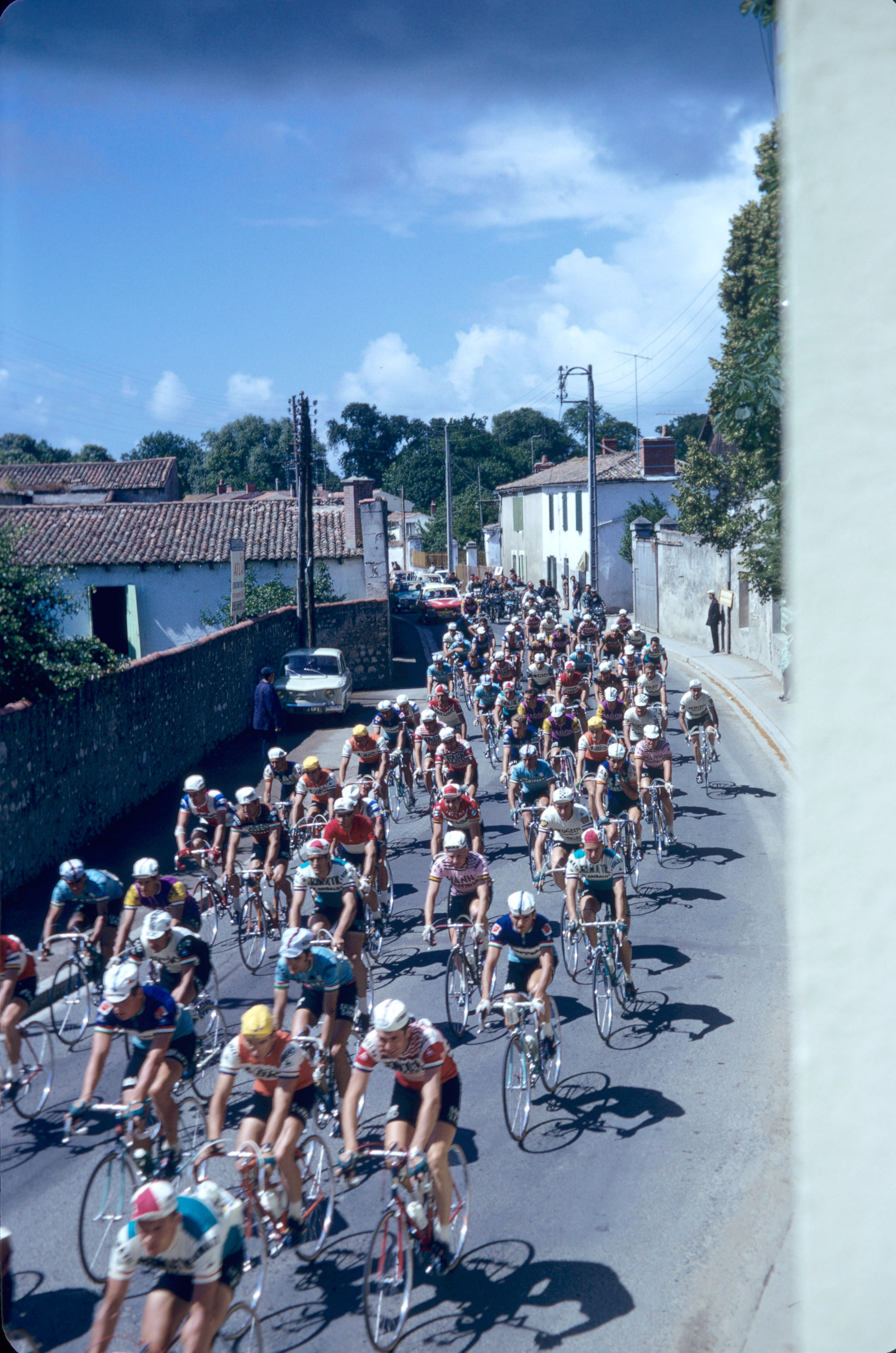 Tour de France cycliste 1970, seconde étape La Rochelle-Angers. Juste après le départ, les coureurs cyclistes passant rue Marius Lacroix au niveau des numéros 51 et 51 bis. Cette photographie a été prise depuis l' étage du 51 bis. La Rochelle, Charente Maritime, France.